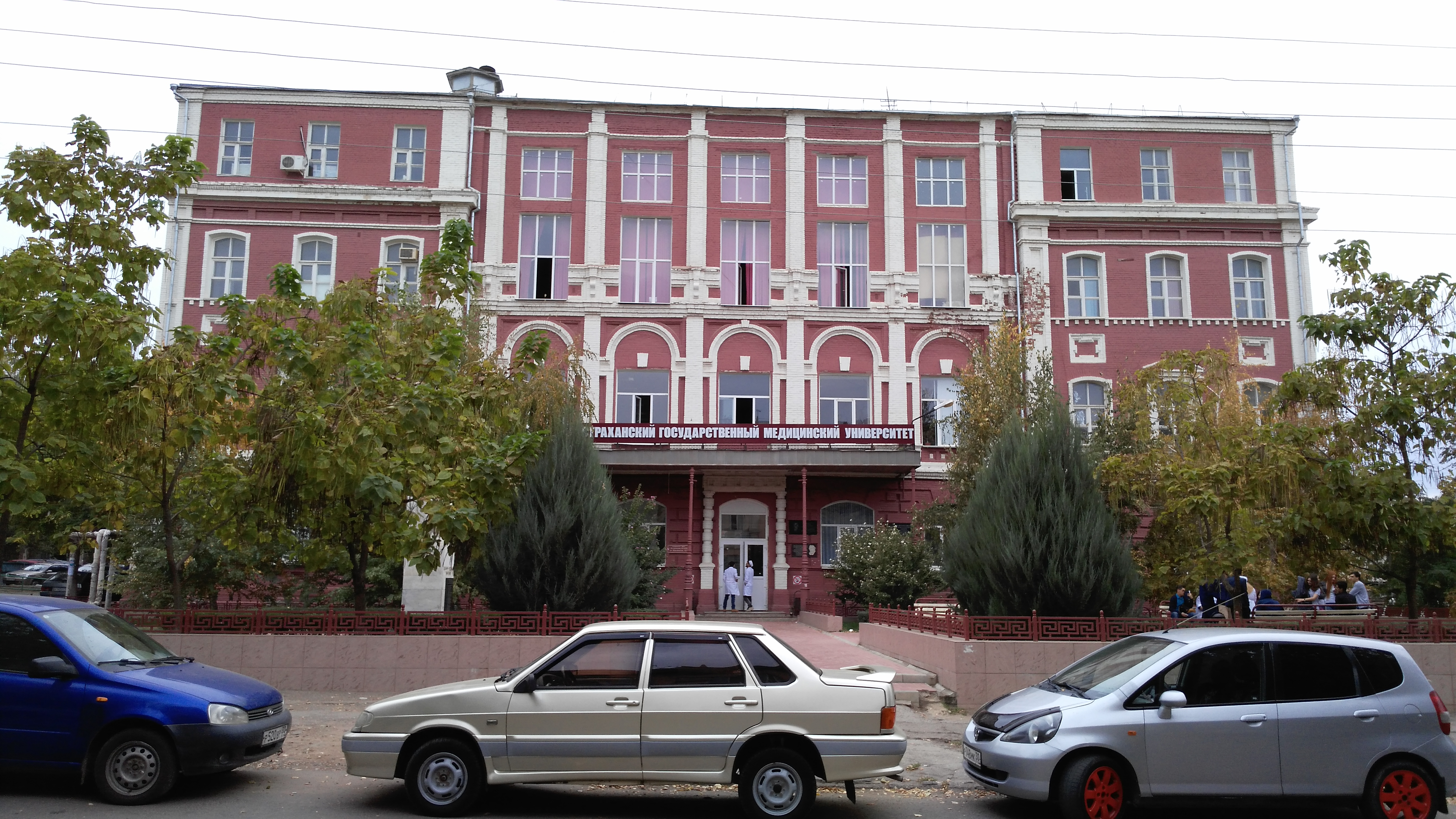 Старый корпус АГМУ.